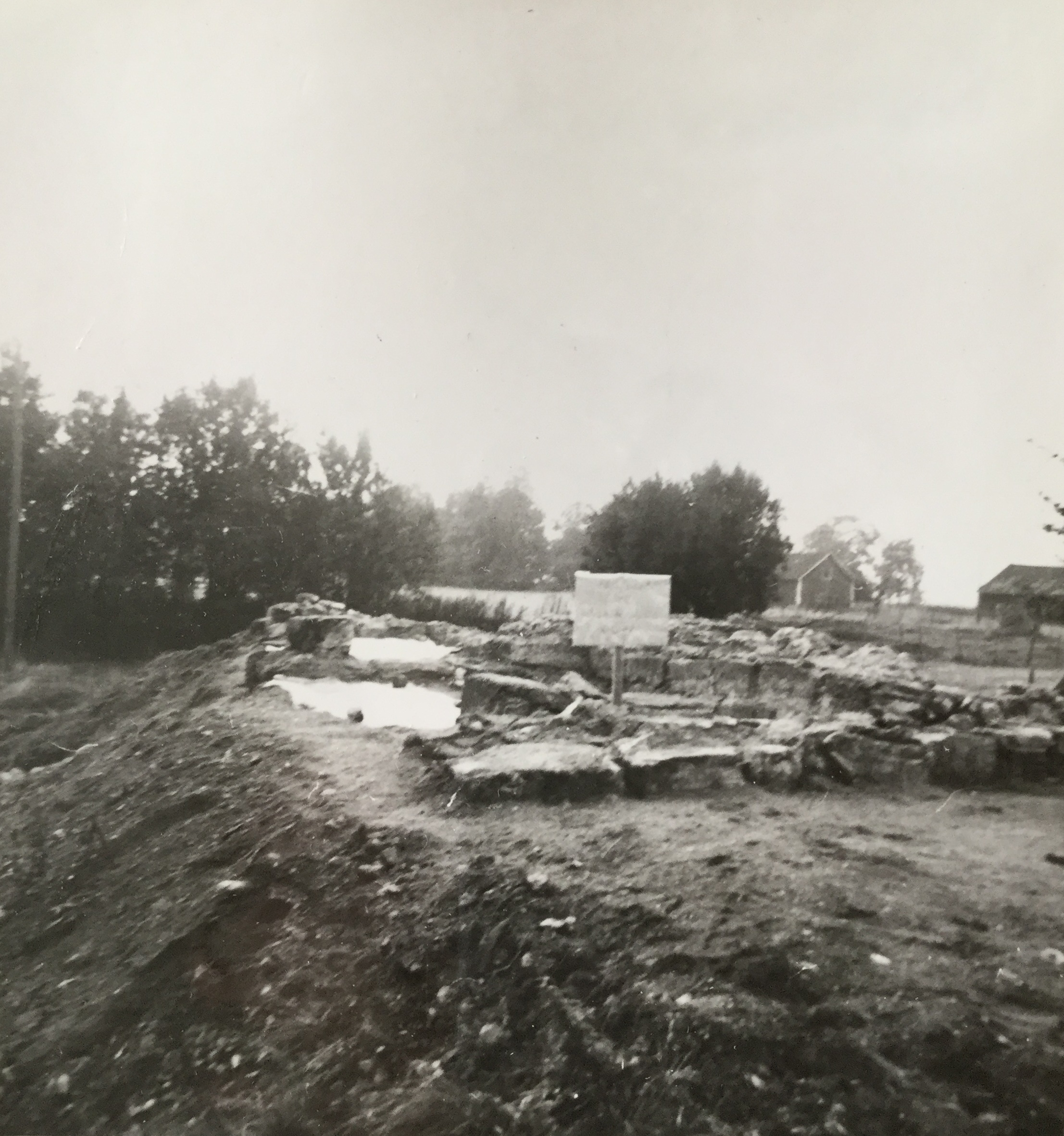 Utgrävning av kyrkoruin